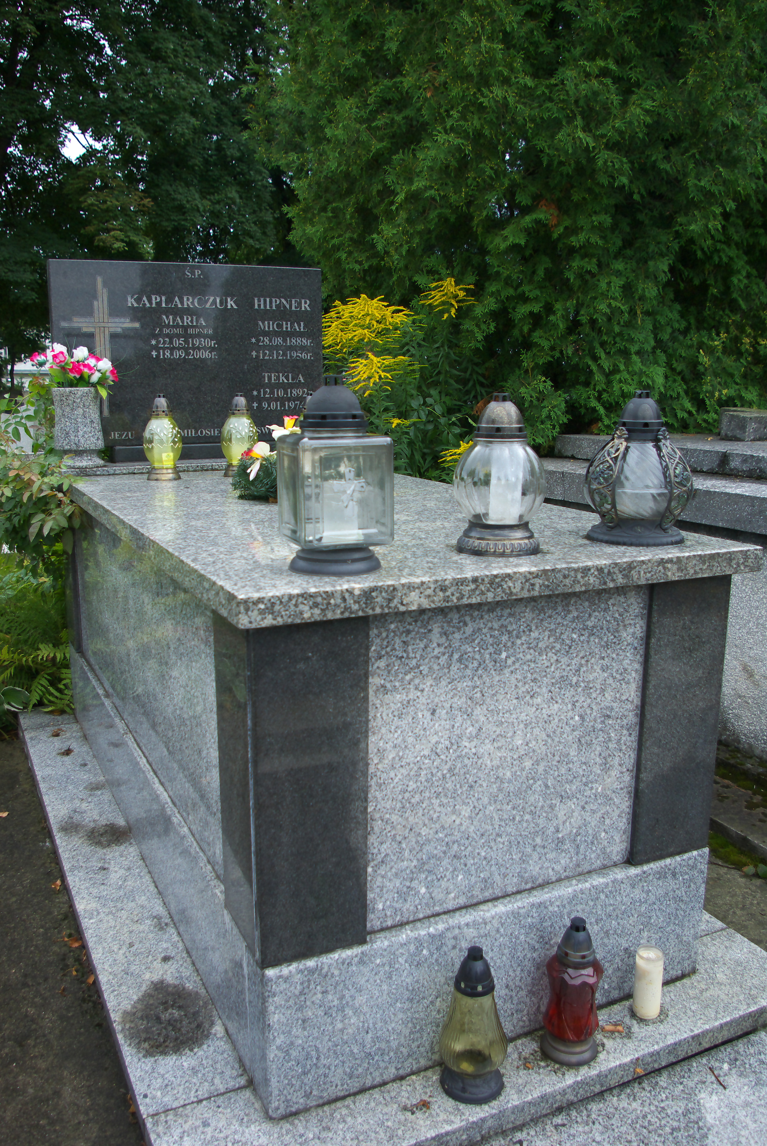 Grobowiec rodziny Hipnerów na Cmentarzu Centralnym w Sanoku